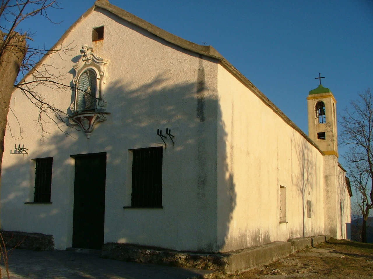 Veduta della chiesa di Santa Croce, Pieve Ligure